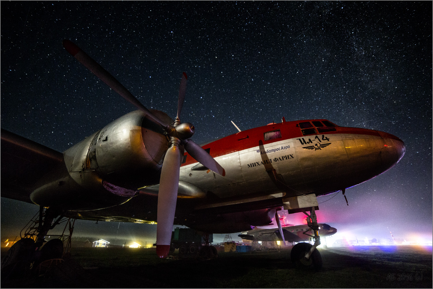 Ил-14 Пингвин на аэродроме Орловка. Воздушному судно присвоено имя Михаила Фариха. Разрешение в OTRS